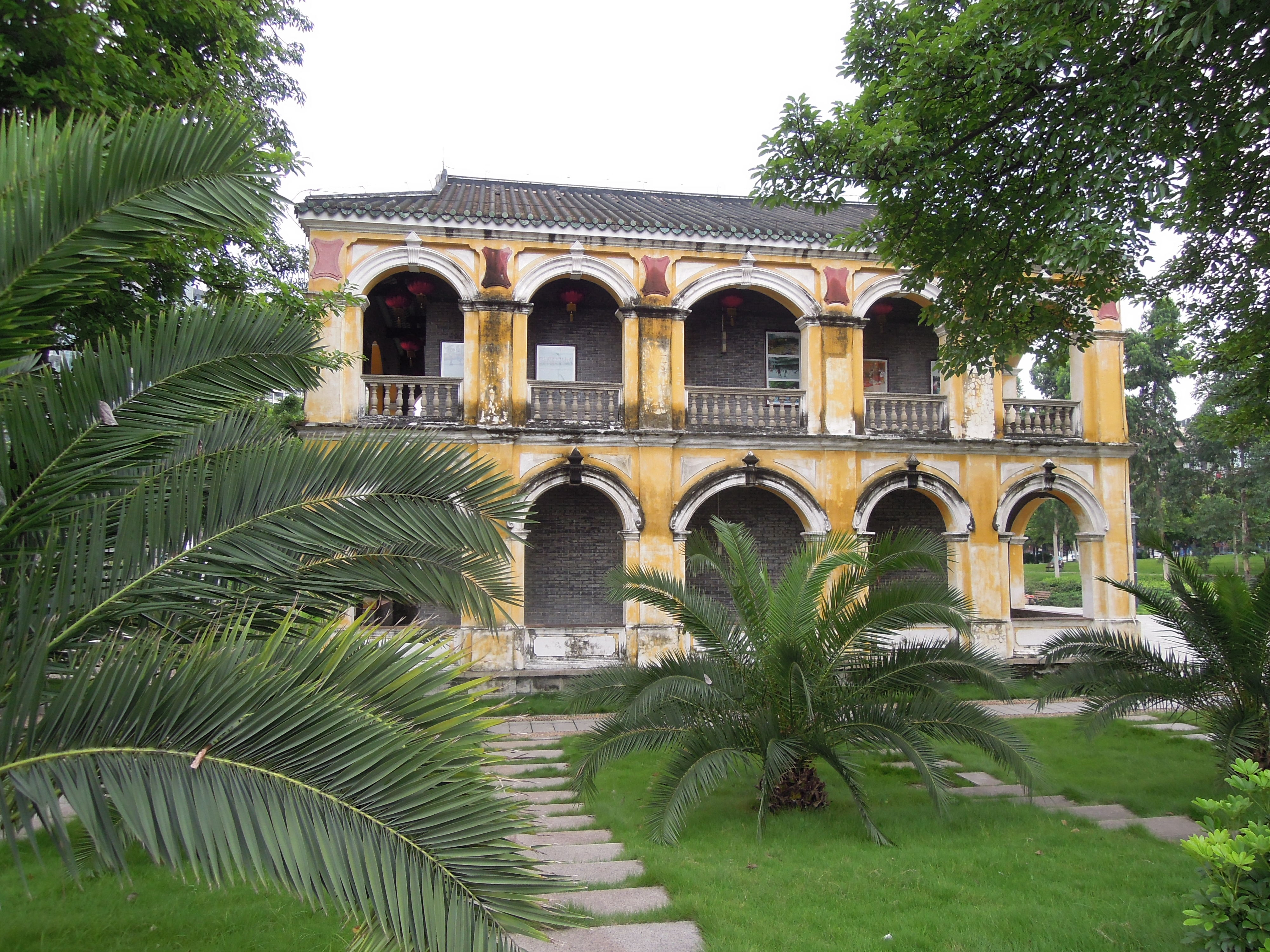 中国广州白云滨江公园